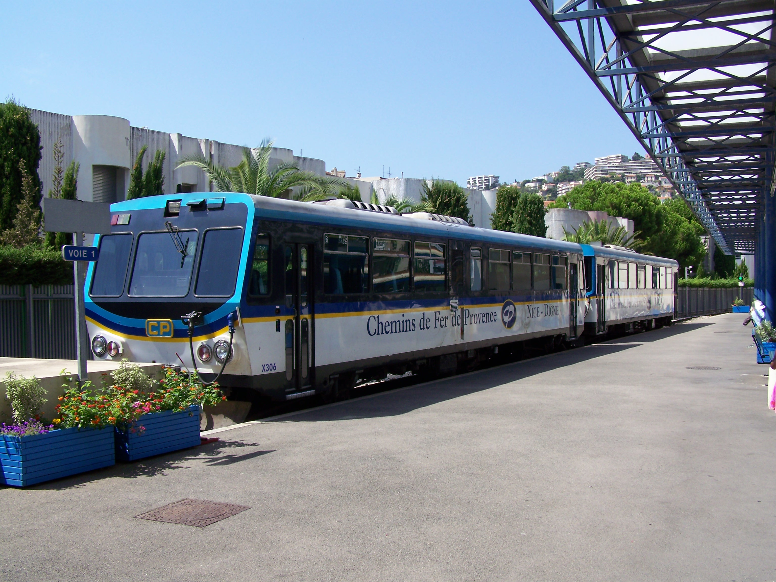 Autorail X306 des Chemins de fer de Provence au terminus de Nice (Alpes-Maritimes, France).